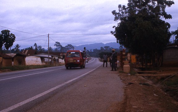 Tro-Tro mit Schaffner